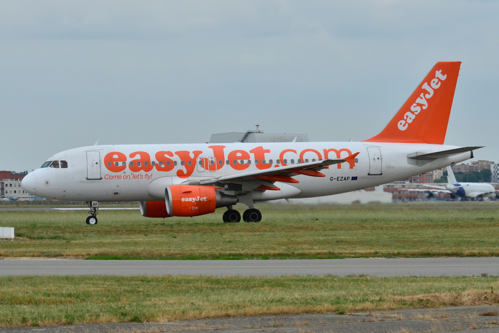 Photo prise à l'aéroport de Toulouse-Blagnac (LFBO) en France. Picture take at Toulouse-Blagnac Airport (LFBO) in France.